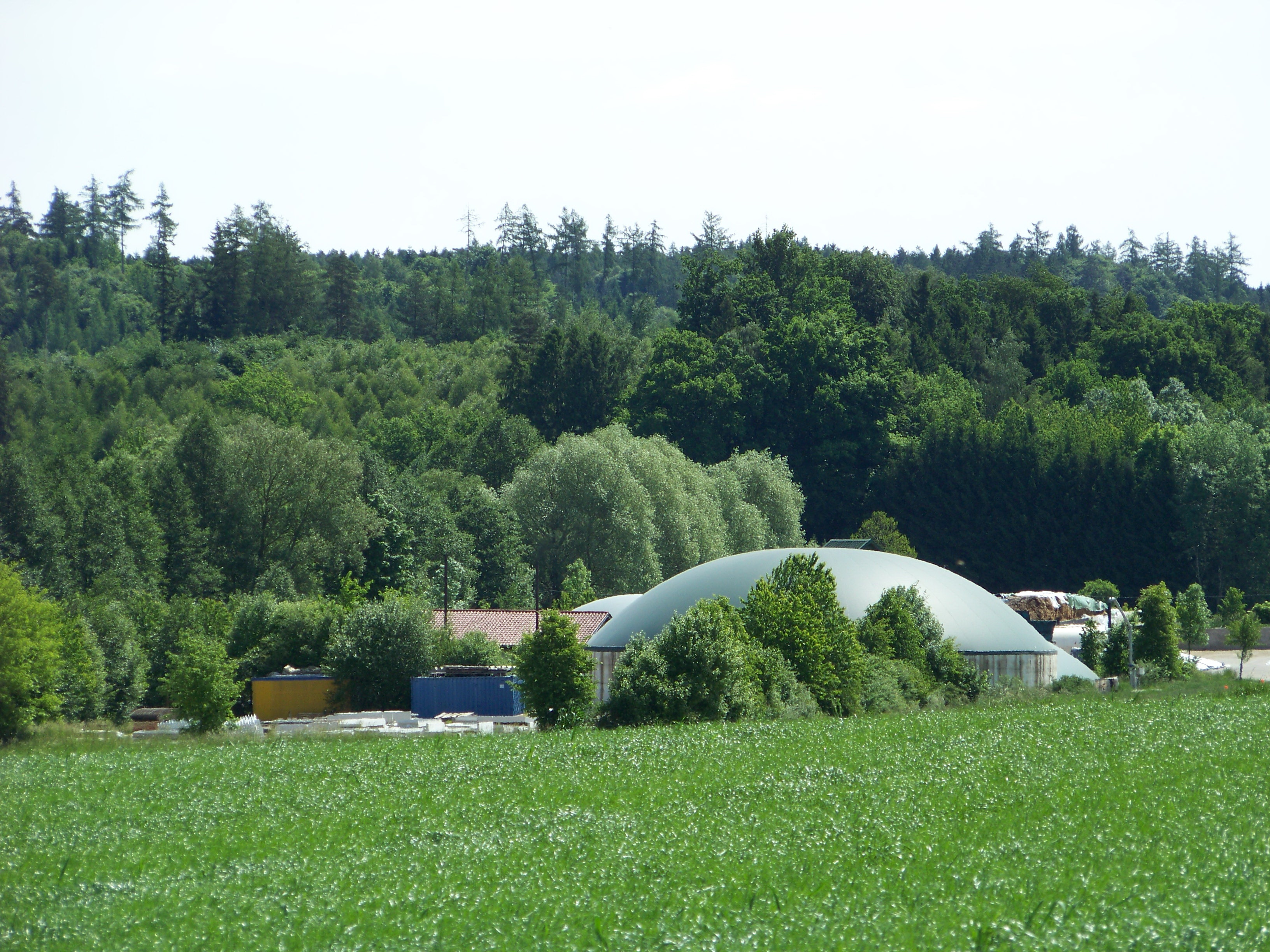 Laberweinting, Hofkirchen. 440 kWh Biogasanlage, Inbetriebnahme 2006. Die Anlage dient zur Erzeugung von elektrischem Strom und zur Wärmegewinnung von etwa 1.600 MWh für das benachbarte Betonfertigteilwerk.